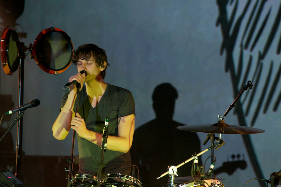 O cantor Gotye.